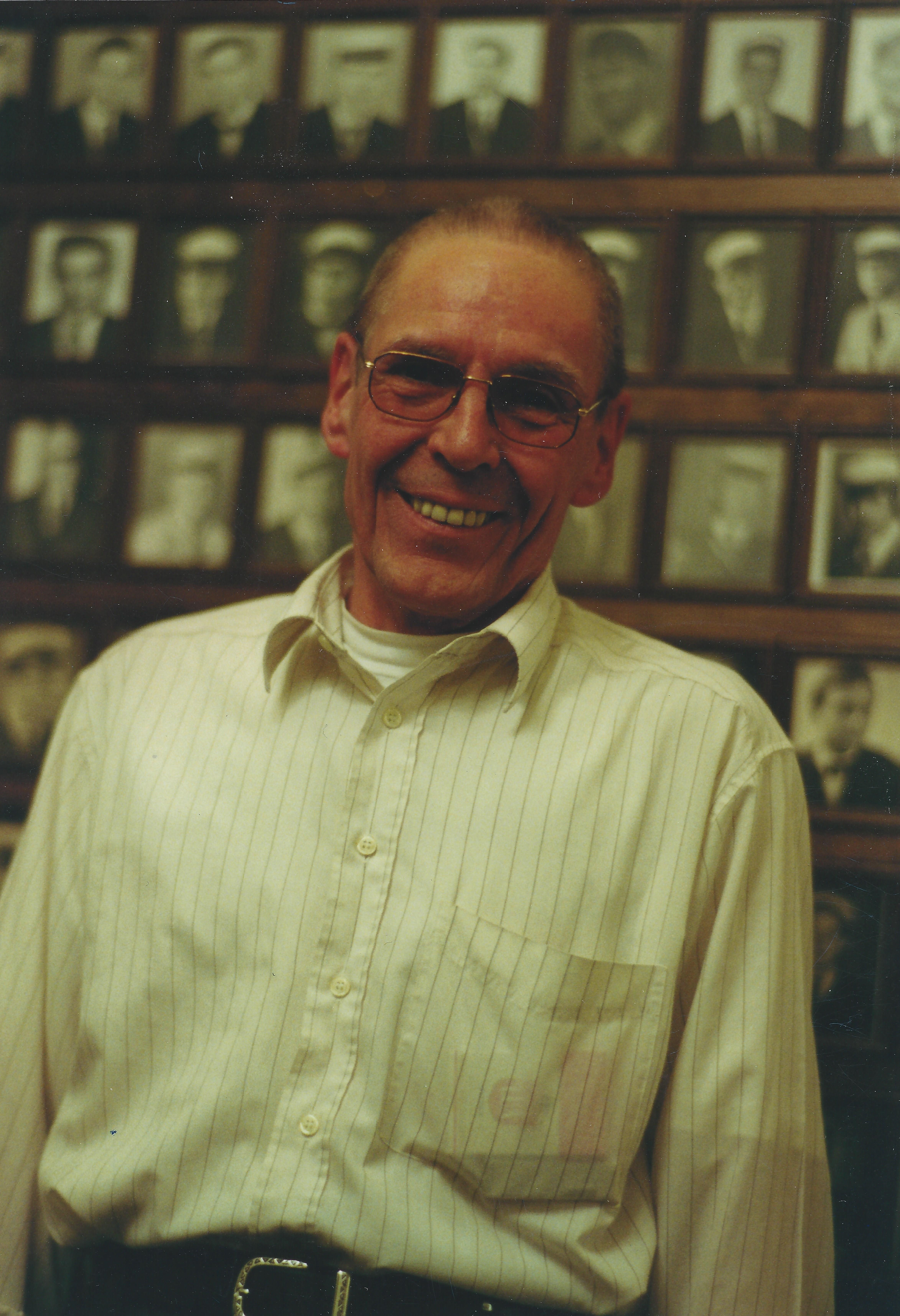 Porträtfotografie von Klaus-Peter Schlünsen (1944-2014)